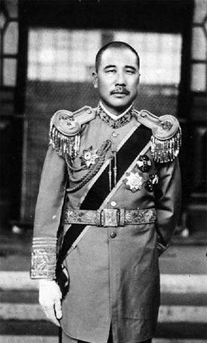 张宗昌，字效坤，山东掖县人，土匪出身，身高1.85米，生得五大三粗却性情刁钻。适逢民国改朝换代，他舞枪弄棒、打家劫舍，拉队伍、抢地盘，侥幸混得一席之地。1925年任山东督办，横征暴敛，贩卖鸦片、勾结日本，成了北洋军阀当中声名最劣的一个，被当作是祸国殃民的军阀样本。